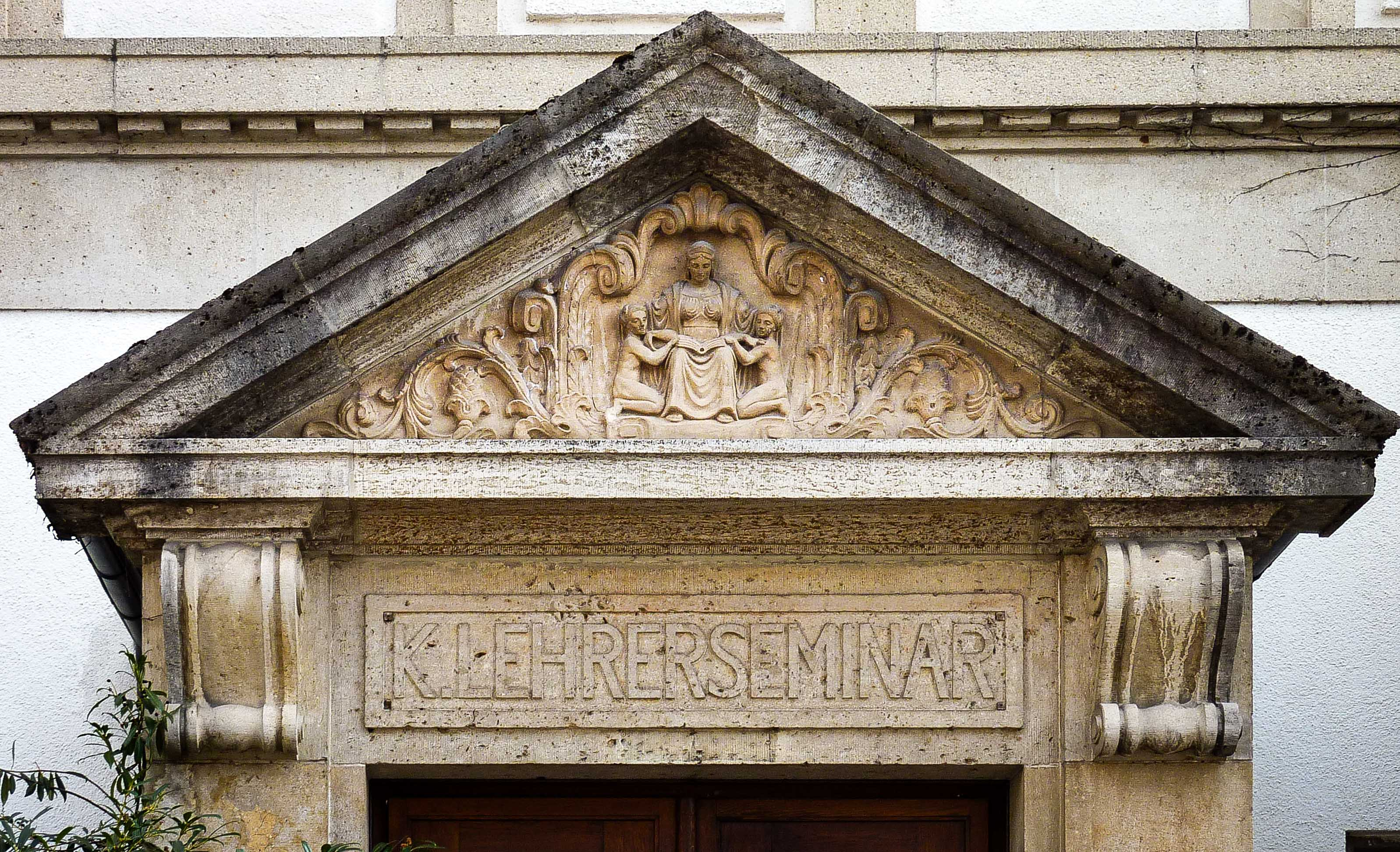 ehemaliges Lehrerseminar Esslingen